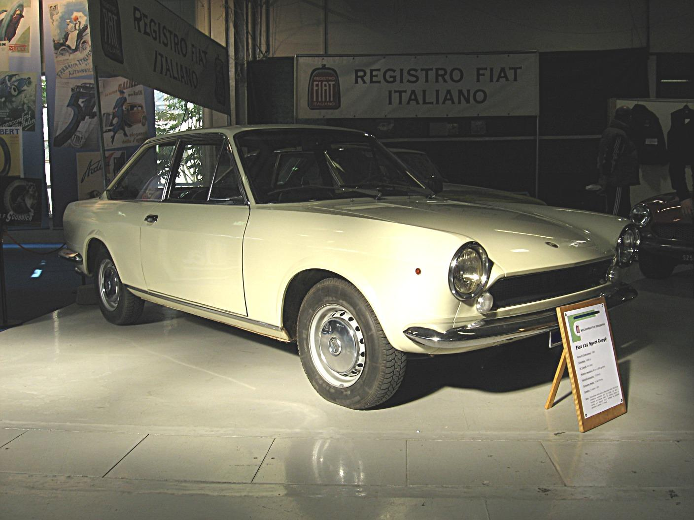 Subject